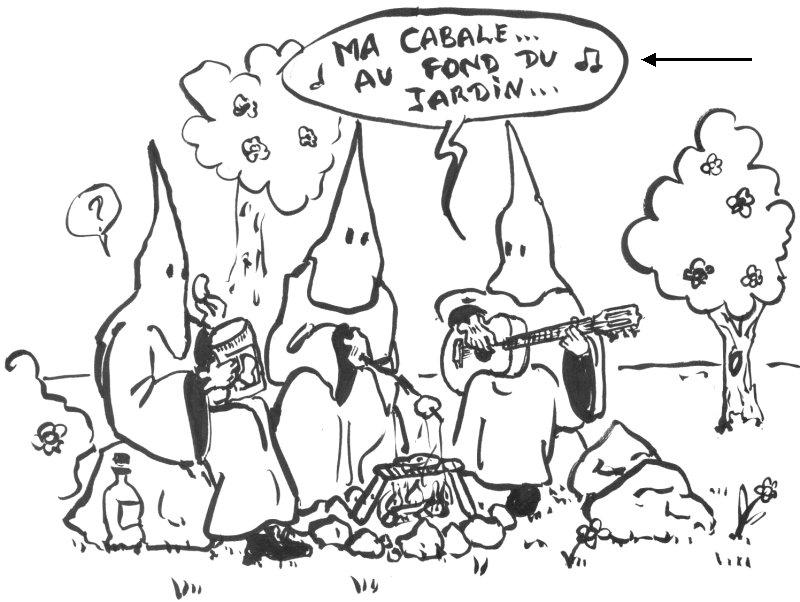 Beispiel Sprechblase (Comic)